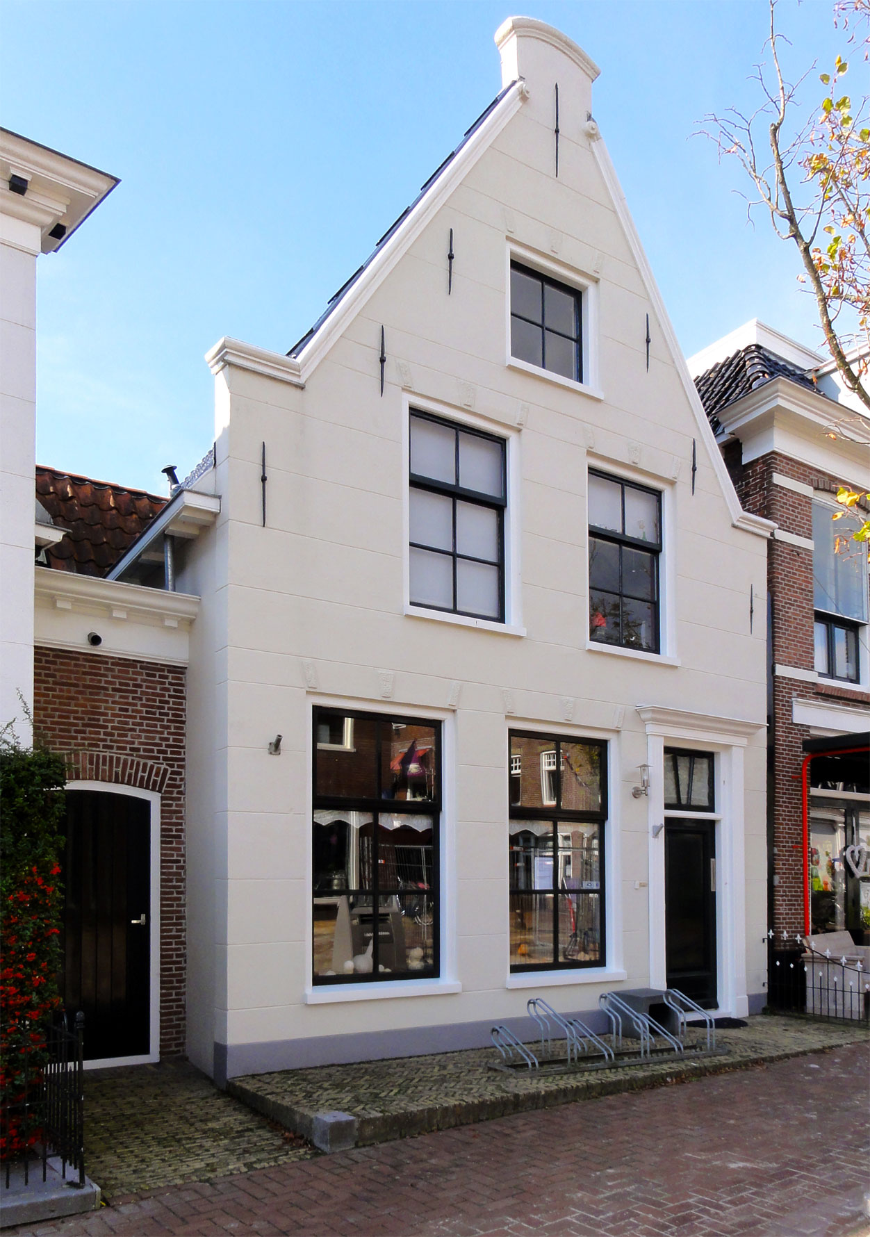 Legeweg 1a Dokkum, rijksmonument